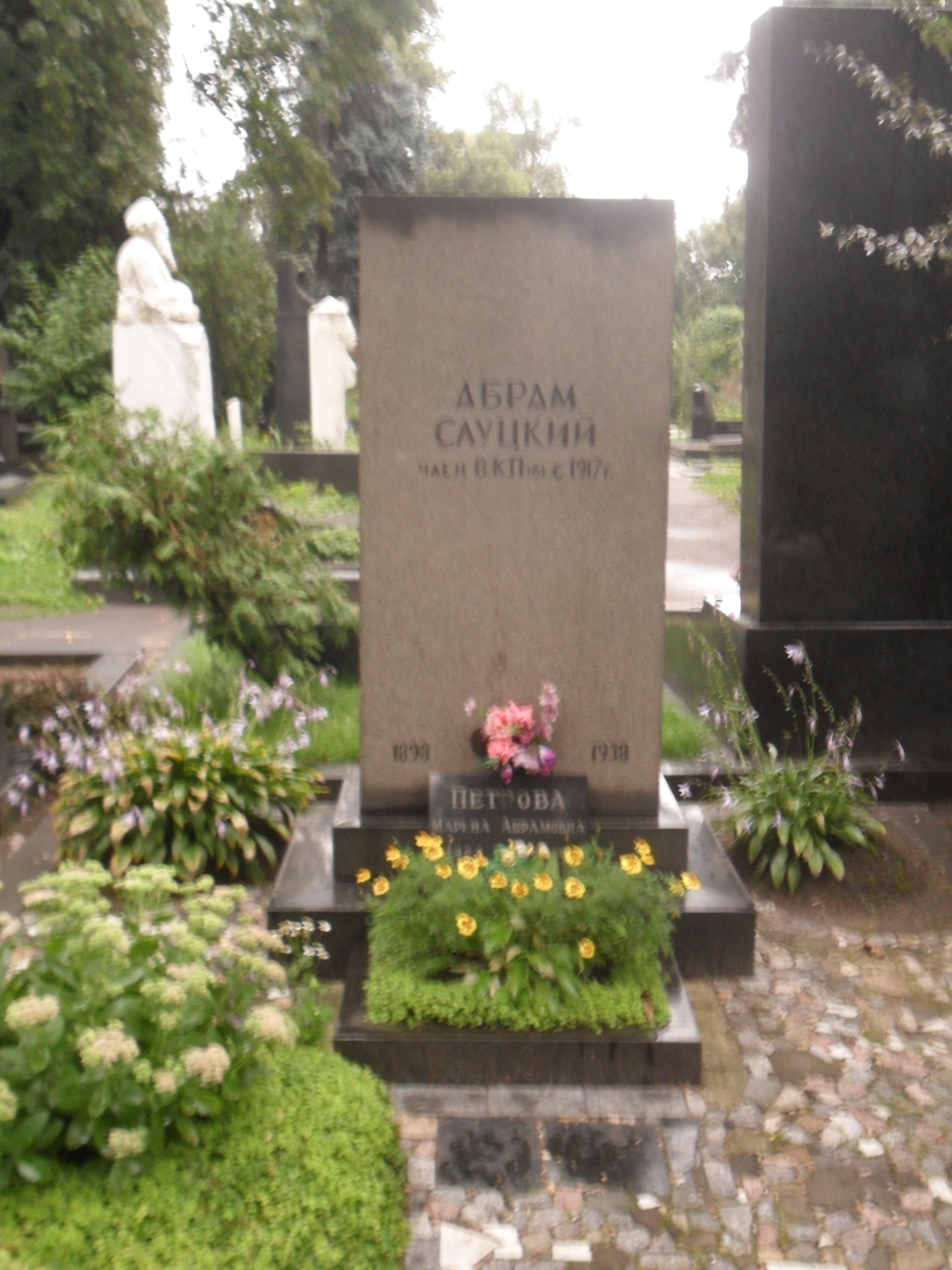 Могила деятеля госбезопасности Абрама Слуцкого на Новодевичьем кладбище Москвы.